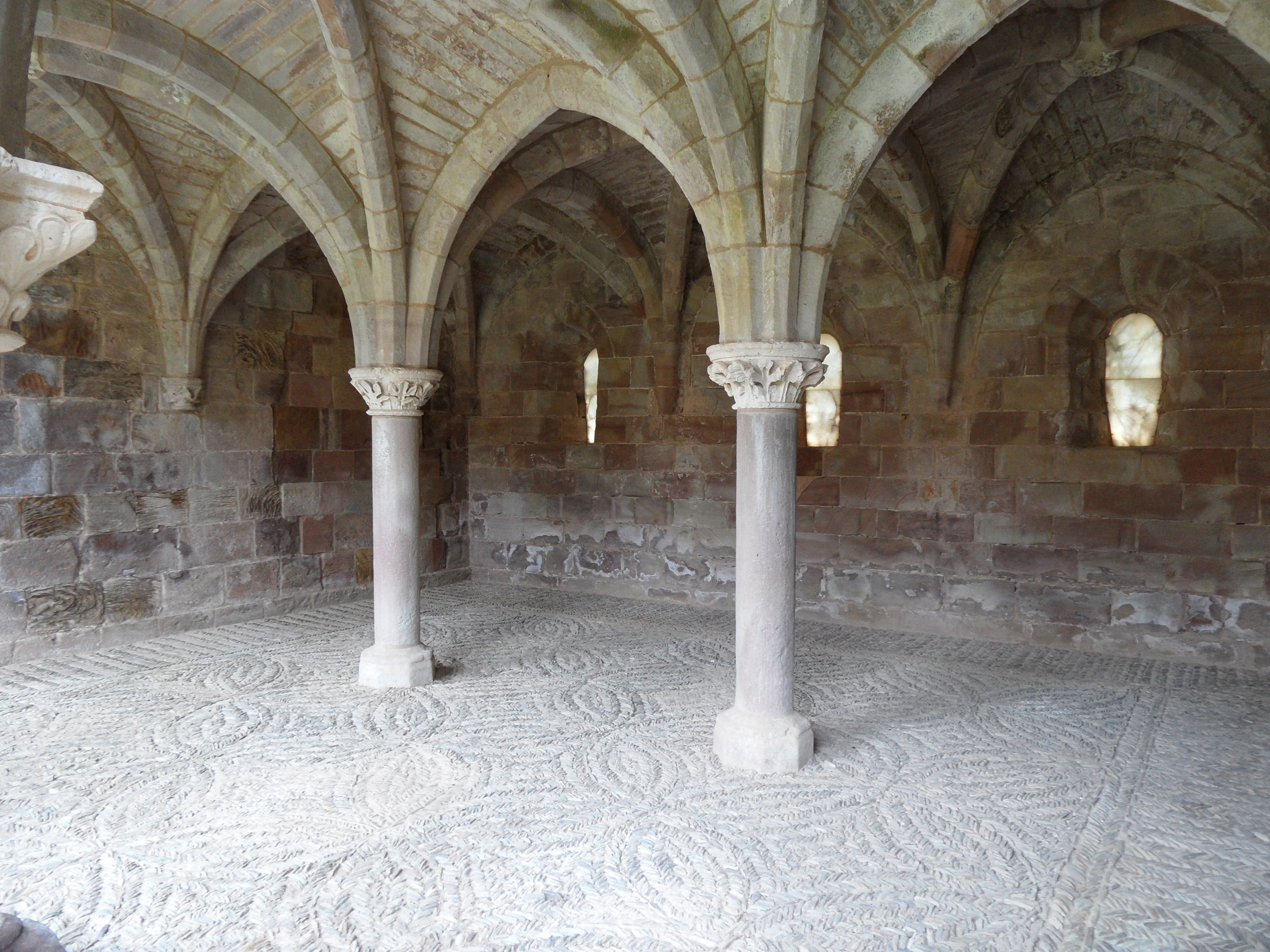 Monasterio Santa Maria de Bujedo de Juarros. Este Monasterio es de propiedad privada, y ha sido restaurado siendo galardonado por la Asociación Europa Nostra en el año 1981